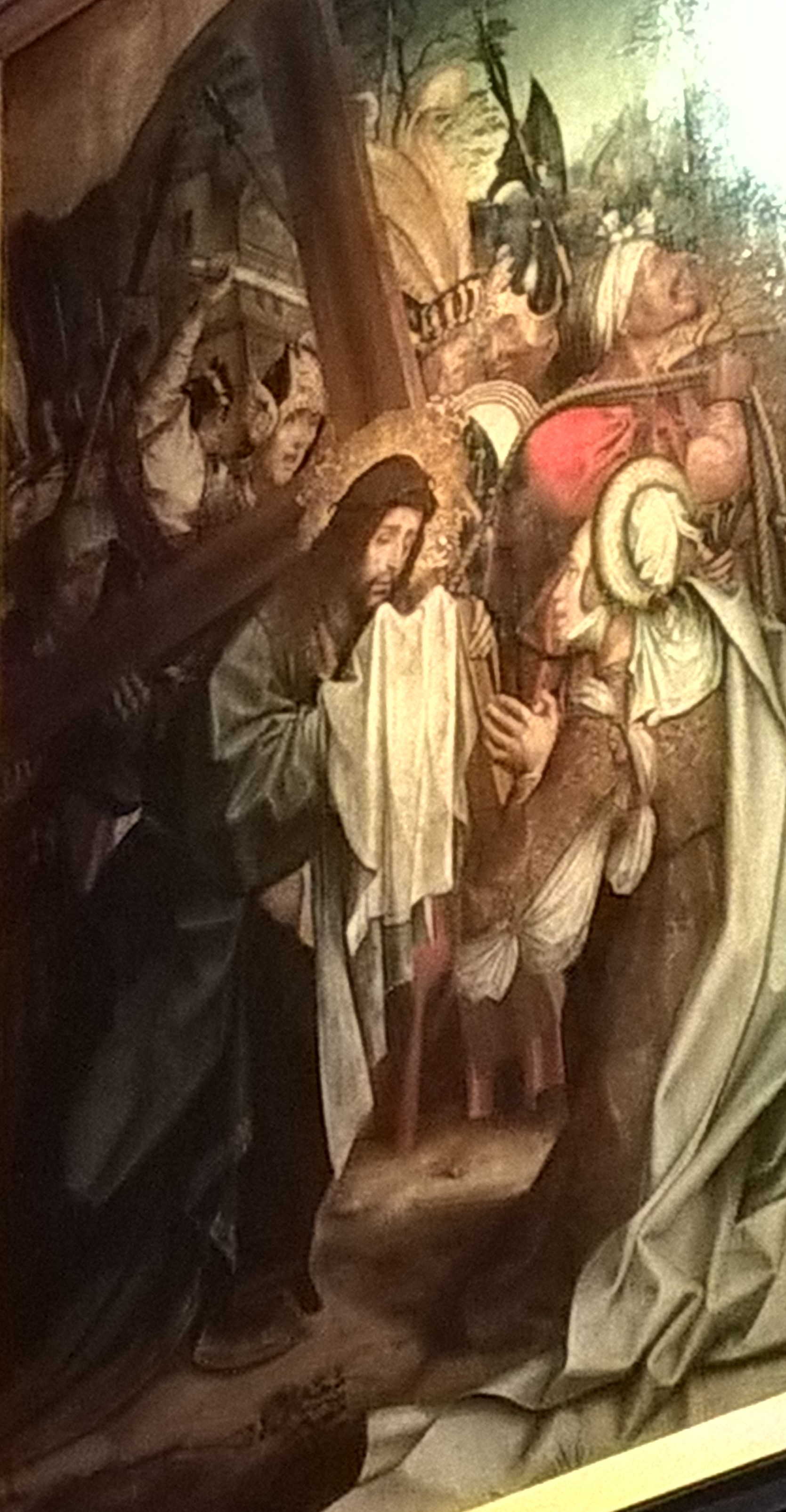 "Cristo e a Verónica", pintura a óleo sobre madeira de 1517-1530 atribuida à oficina do Jorge Afonso e que fez parte do Retábulo Convento de Jesus.